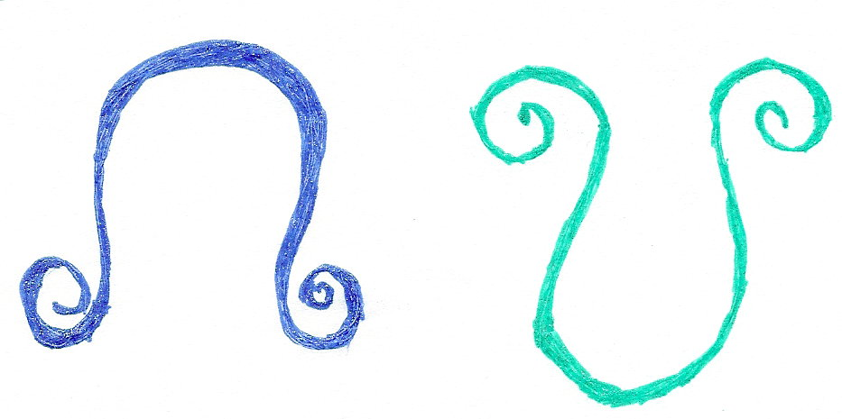 Son los Nodos Norte y Sur. El de color azul oscuro es el Nodo Norte y el Verde, el Sur